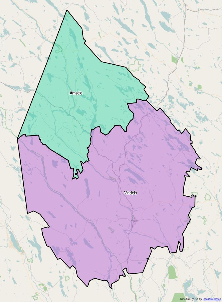 Distriktsindelningen i Vindelns kommun World file 208.25409091066637757 0 0 -208.25409091066637757 2099927.98240845371037722 9556963.54163692705333233